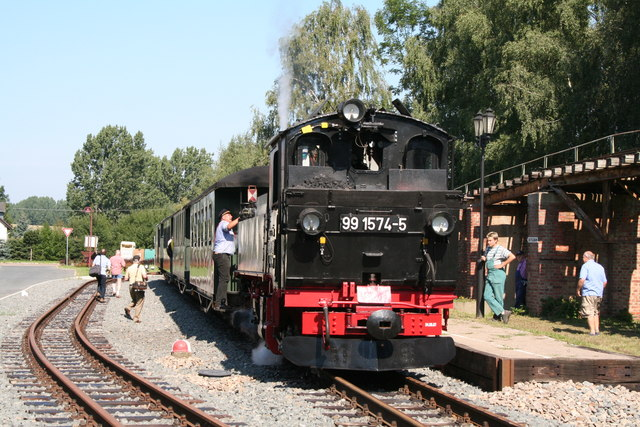 Doellnitzbahn train at Glossen